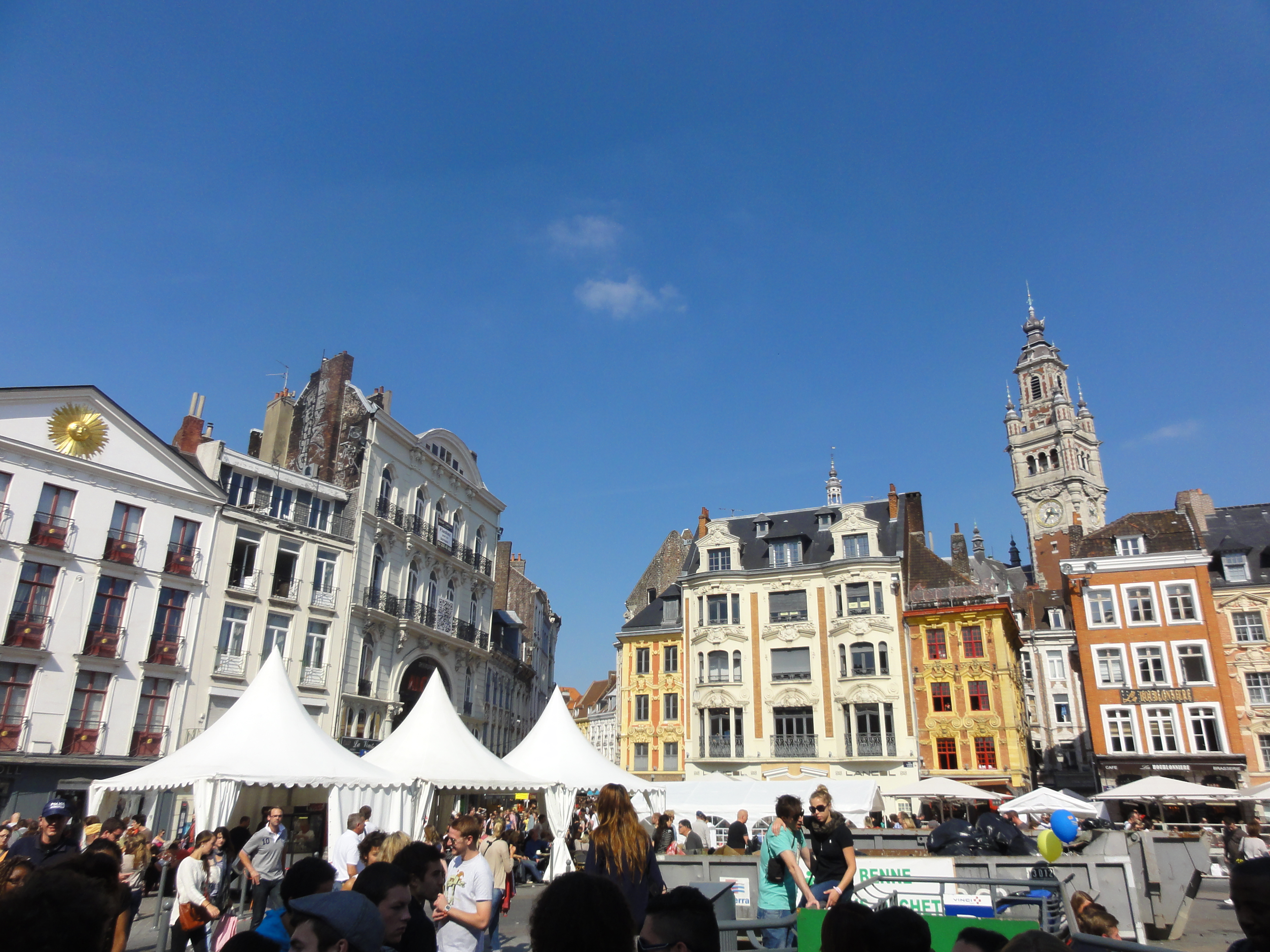 L'édition 2012 de la Braderie de Lille s'est déroulée du samedi 1er au dimanche 2 septembre.